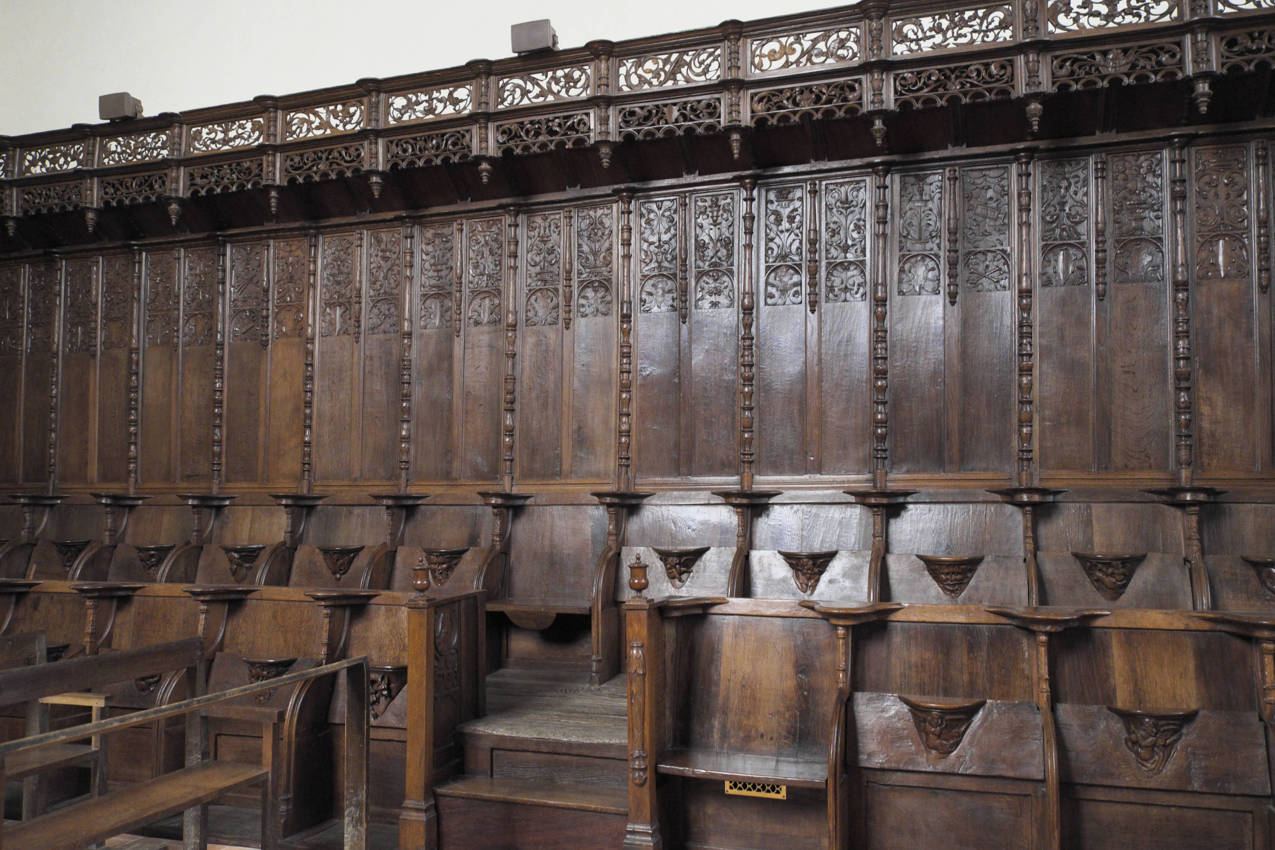 Kirche Sainte-Marie-Madeleine, ehemalige Stiftskirche Notre-Dame, in Champeaux im Département Ille-et-Vilaine (Region Bretagne/Frankreich), Chorgestühl aus dem 16. Jahrhundert